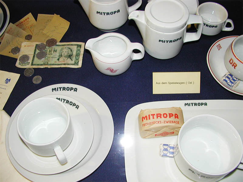 Speisewagenservices der Mitropa